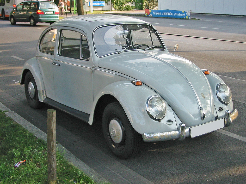 VW 1300 (Modell 67, gebaut von September 66 bis August 67)